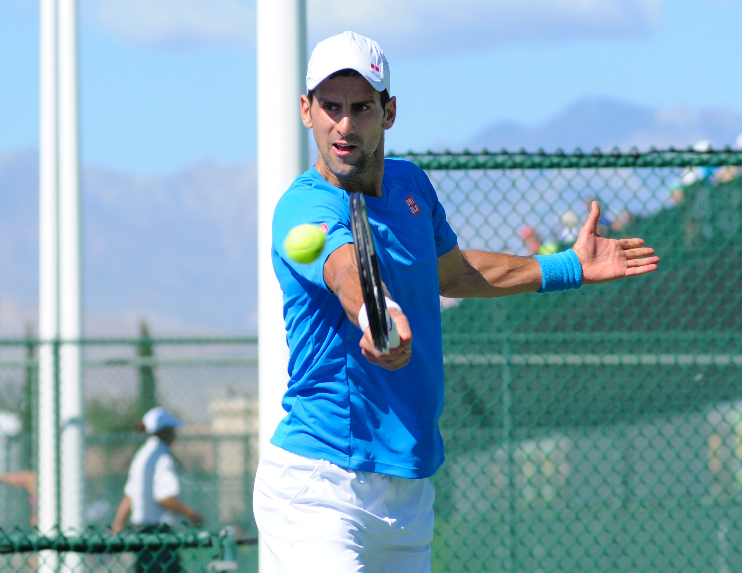 2015 BNP Paribas Open